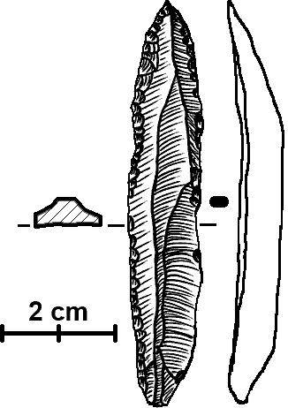 Punta de El-Wad, Oriente Medio - Tipo no real